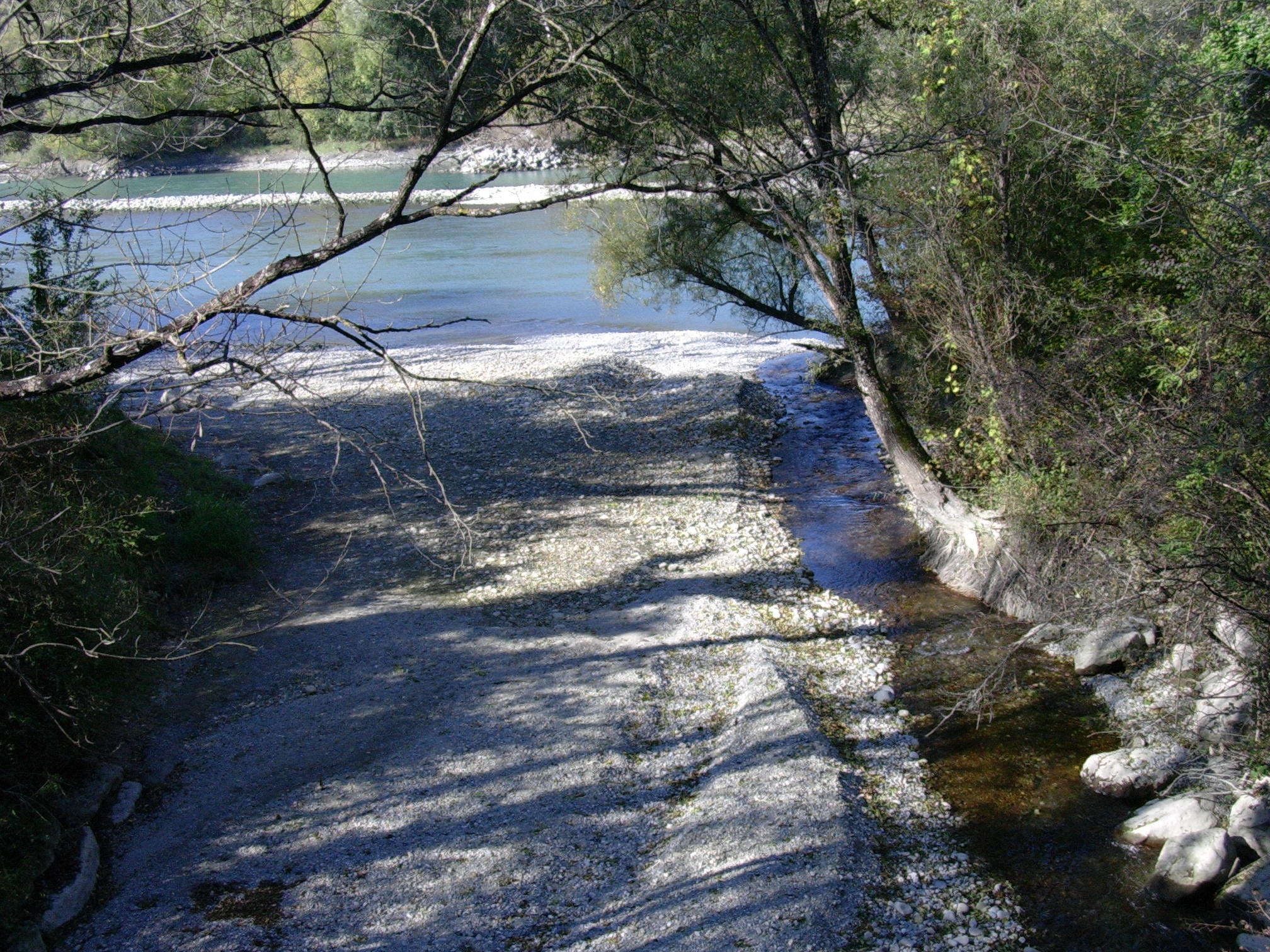 L'embouchure de Laire